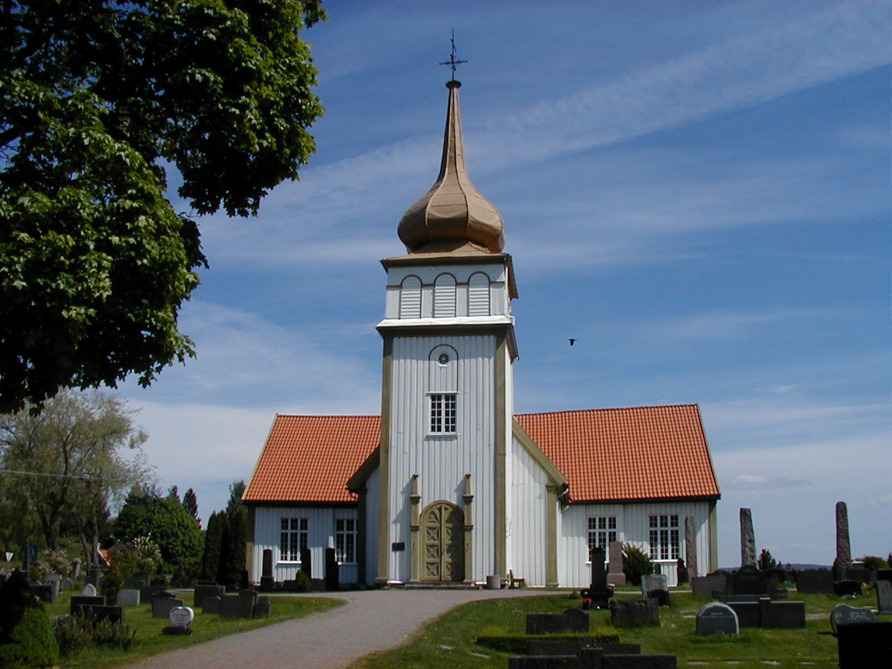 Vinger kirke, Norway